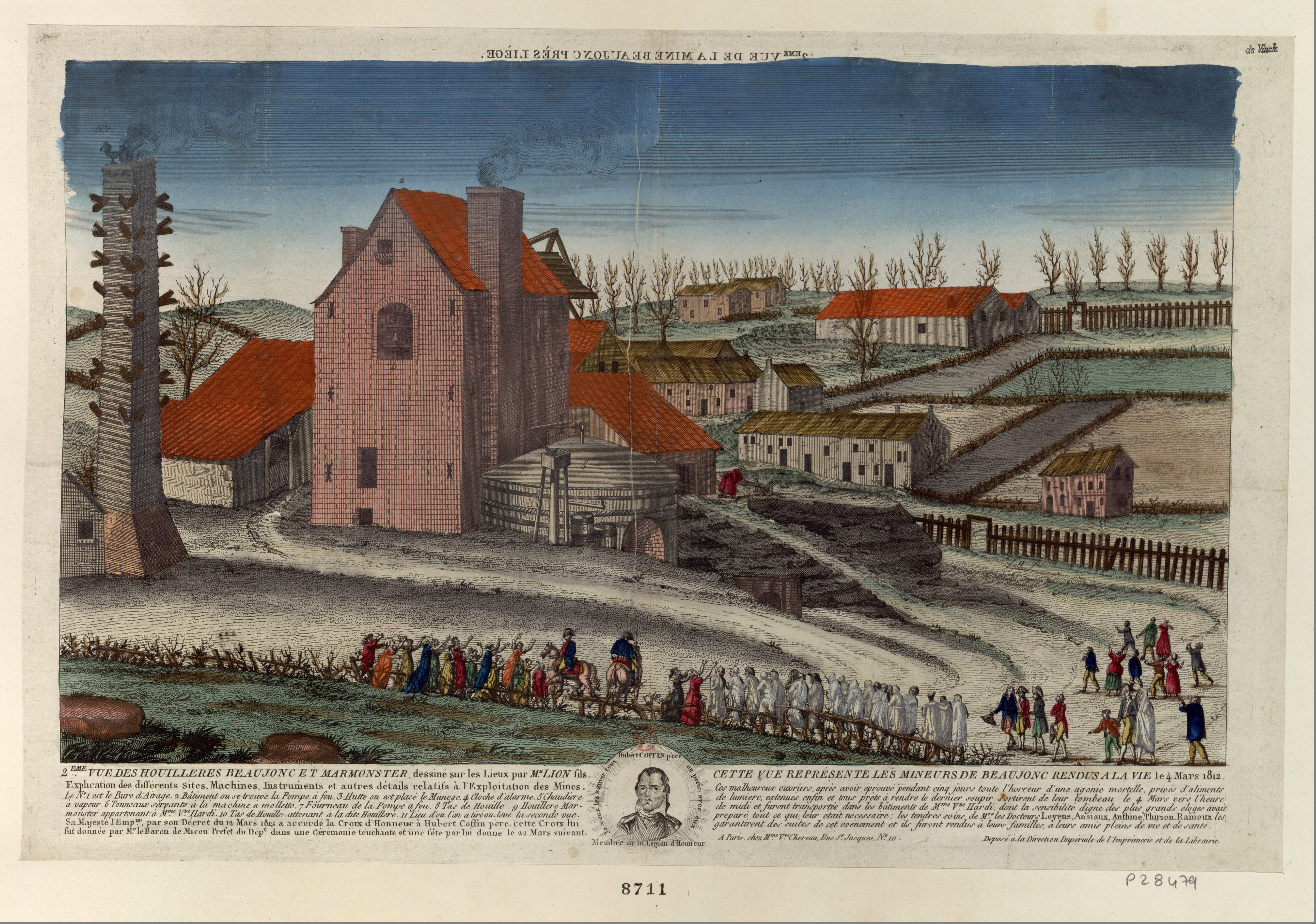 Bures Beaujonc et Mamonster par M.r Lion fils en 1812 (cf Hubert Goffin) à Liège, sur concession Société anonyme des Charbonnages de Patience et Beaujonc réunis